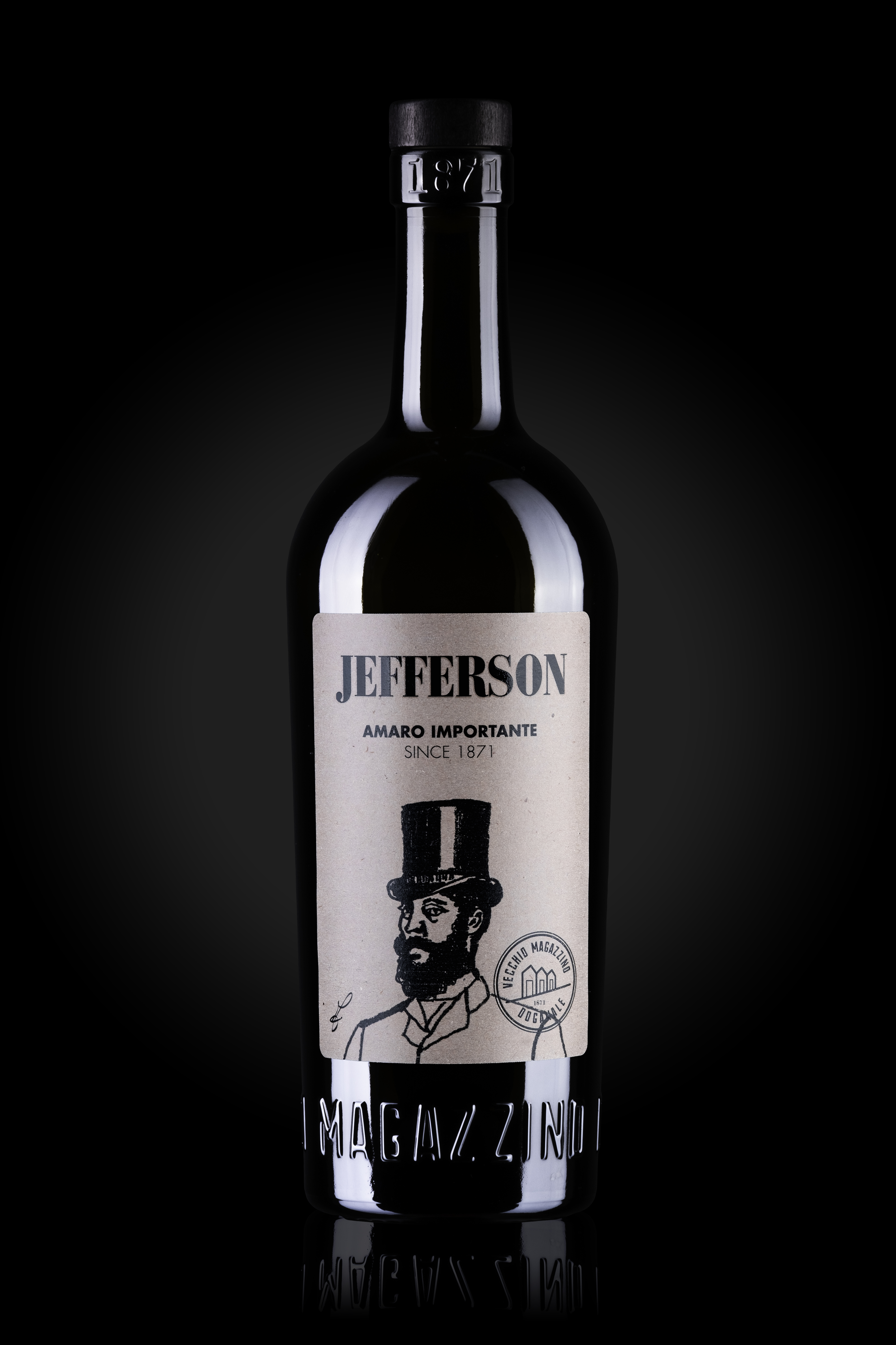 Jefferson Amaro Importante